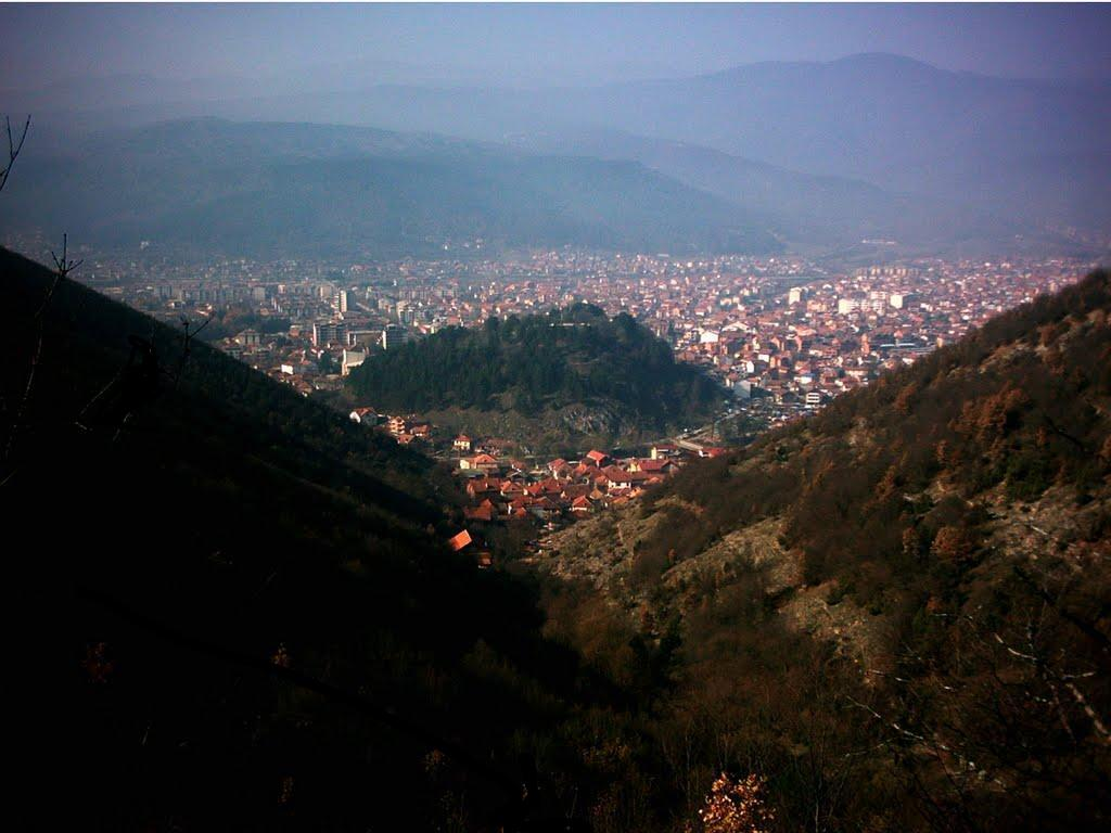 Кичево од Китино Кале